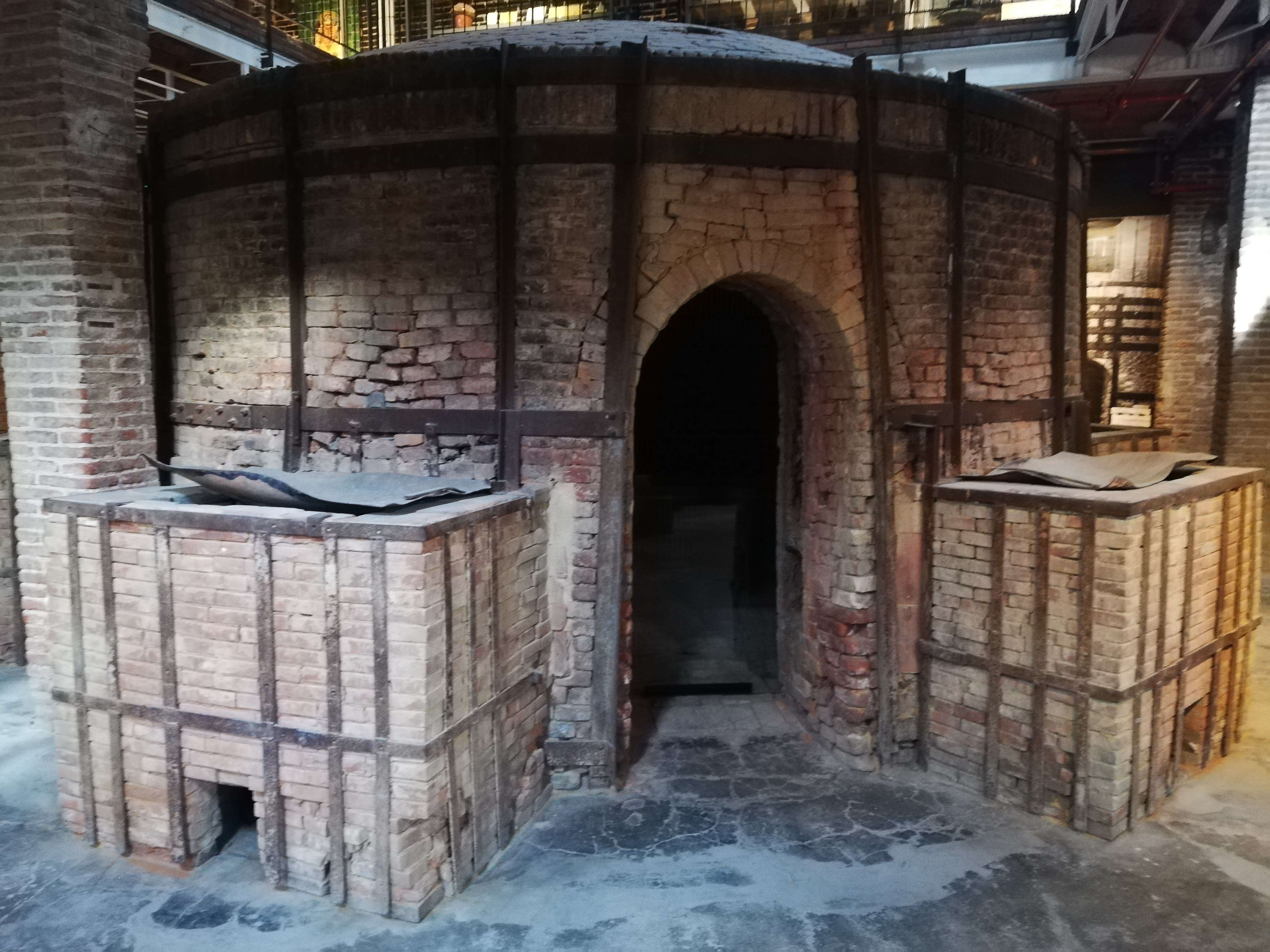 Forn de flama invertida al Terracotta Museu.